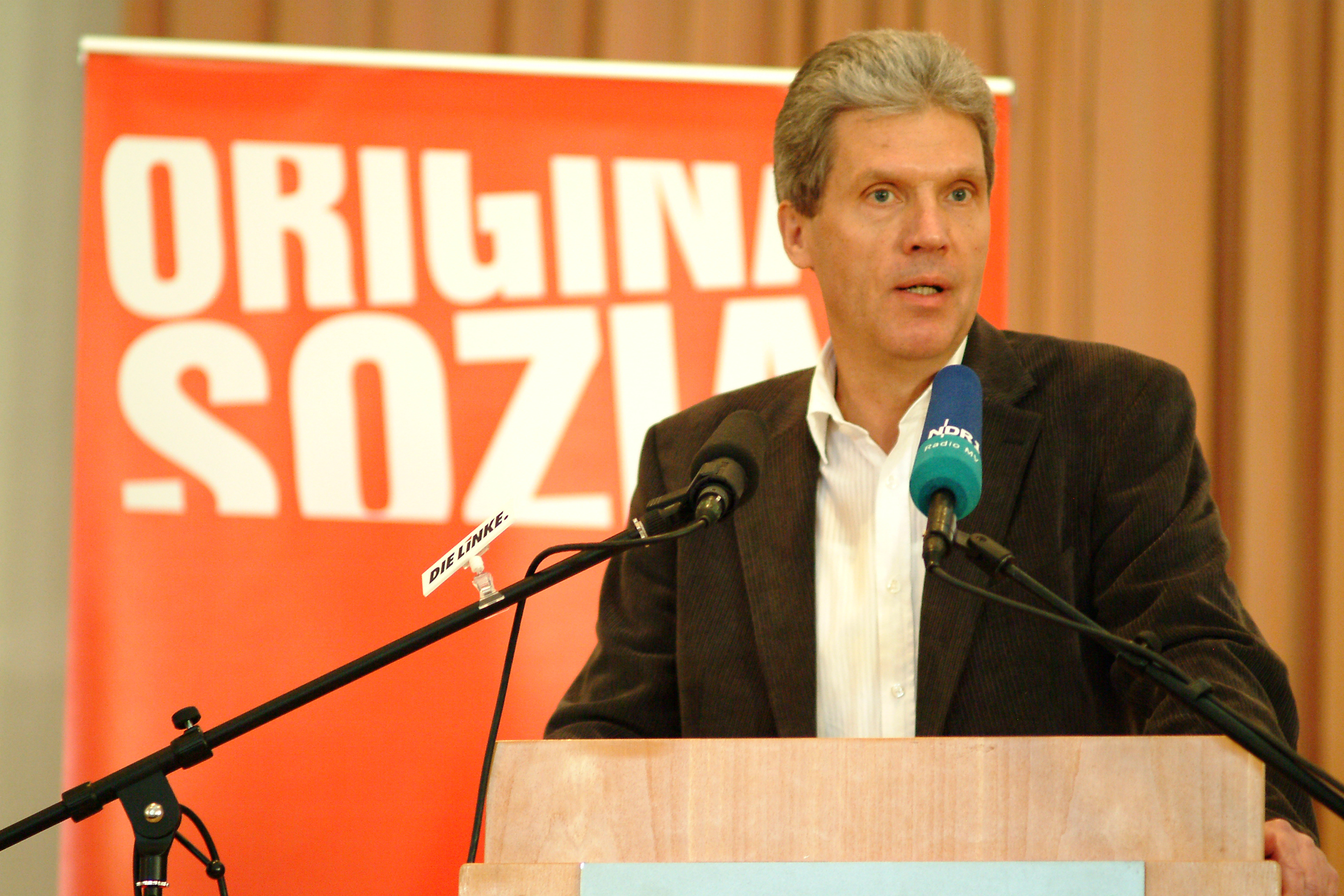 Helmut Holter (Fraktionsvorsitzender DIE LINKE im Landtag Mecklenburg-Vorpommern) auf dem Landesparteitag am 17. April 2010